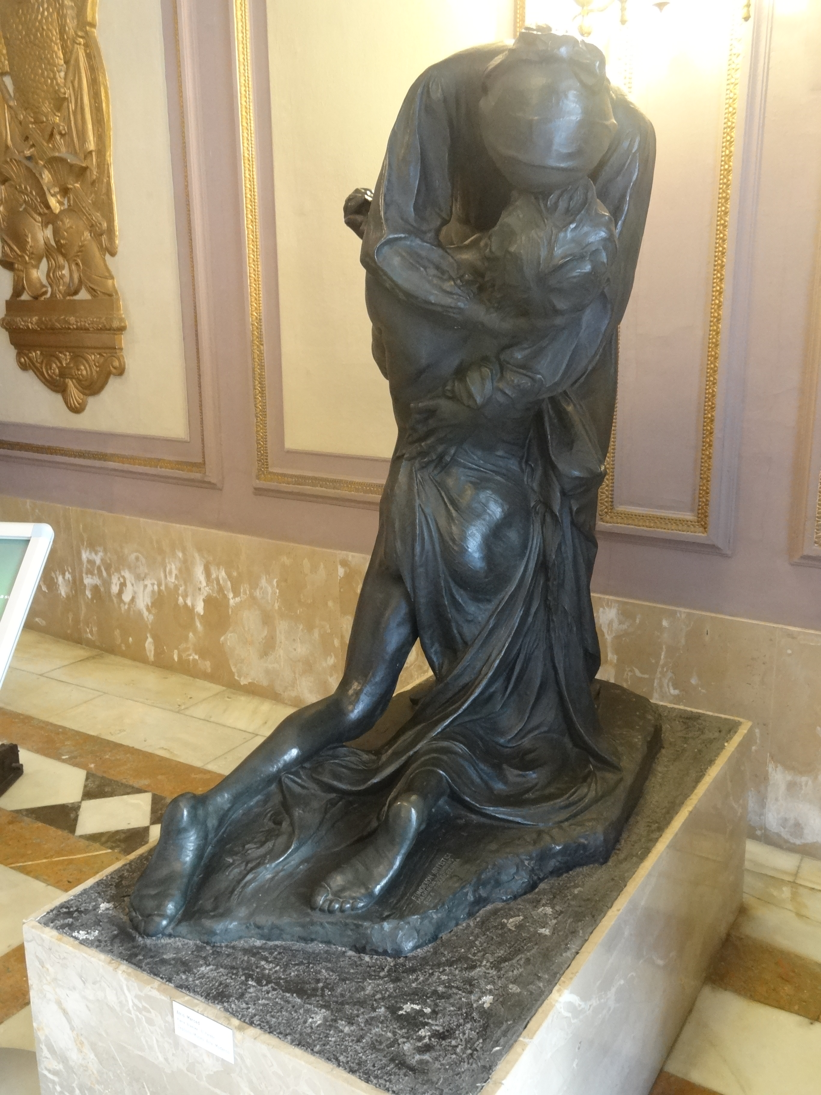 El Perdó - Obra de 1898 de Pieter (o Pierre) Braecke - Dipòsit del museu d'art modern. Representa una mare abraçada a un fill que demana perdó.